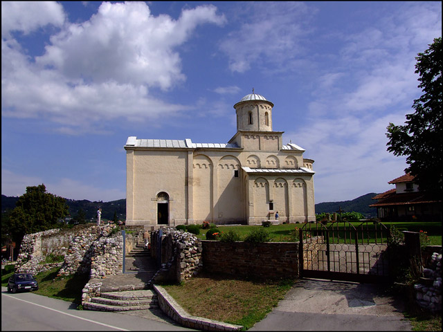 An Orthodox church in Arilje, Serbia/Une église orthodoxe à Arilje, une des villes principales de Serbie